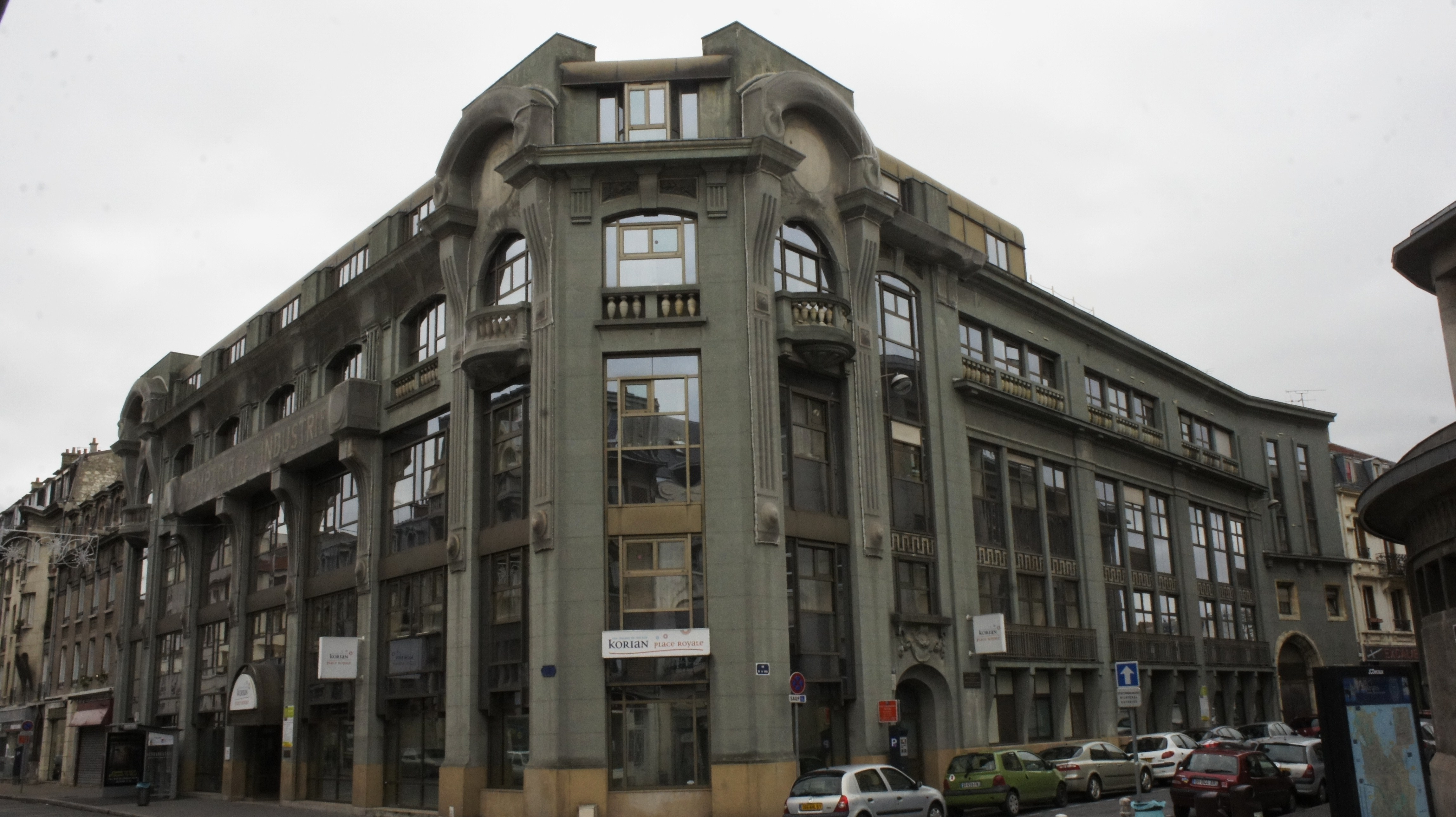 Dans la rue Cérès de Reims l'ancienne façade du Comptoir_de_l'industrie; actuellement une maison pour personnes âgées .